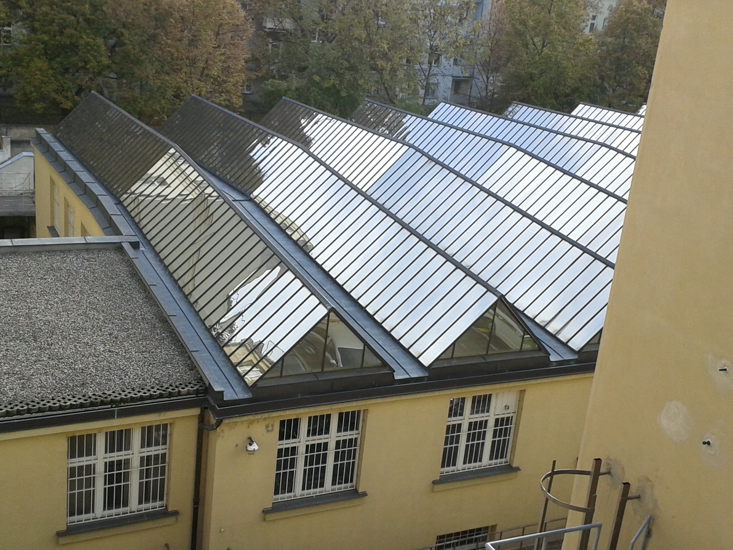 Budova bývalého Vojenského zeměpisného ústavu (VZÚ) v Praze byla projektována českým architektem, malířem a scénografem Bedřichem Feuersteinem v průběhu let 1921 až 1923. Realizace stavby proběhla v letech 1923 až 1925. Dnešní (2016) adresa: Praha 6, Bubeneč, Rooseveltova čp. 620/23. Ve dvoře budovy je umístěn obří objekt tiskárny o rozměrech 50 metrů x 26 metrů a zabírající plochu 1.317 metrů čtverečních. Bedřich Feuerstein byl ostatními kolegy architekty v případě realizace budovy VZÚ oceňován především za skleněnou shedovou (pilovou) střechu této tiskárny. Pohled na střechu tiskárny ze 4. patra budovy VZÚ (říjen 2016).